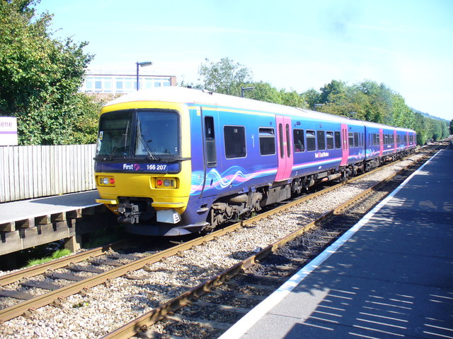 Deepdene Station